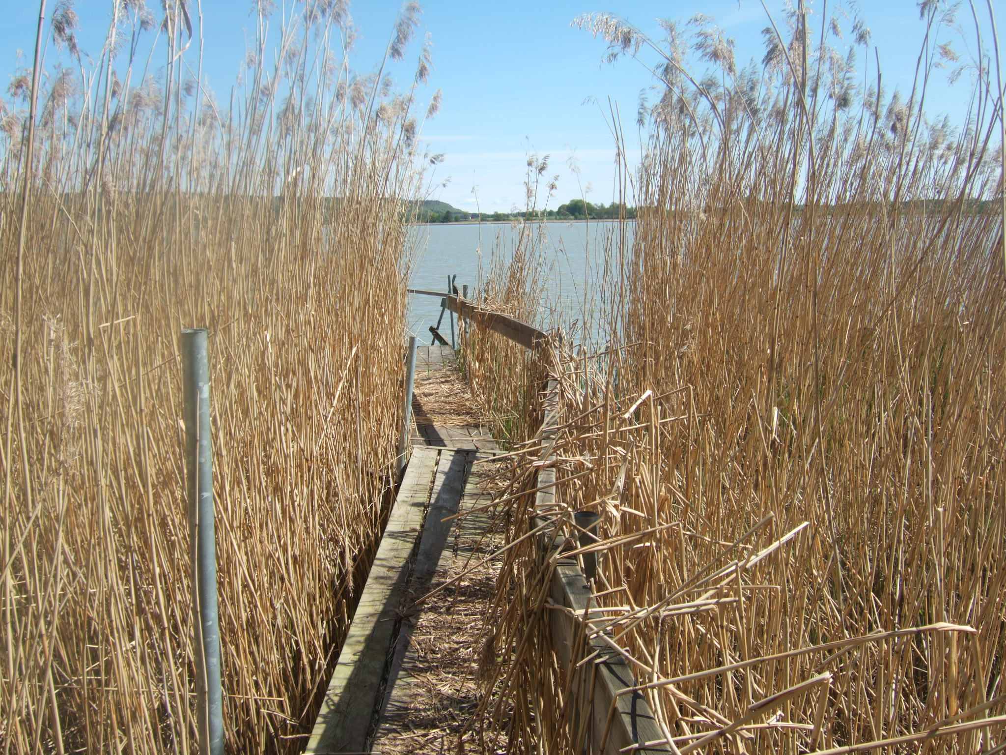 Hullsjöns naturreservat